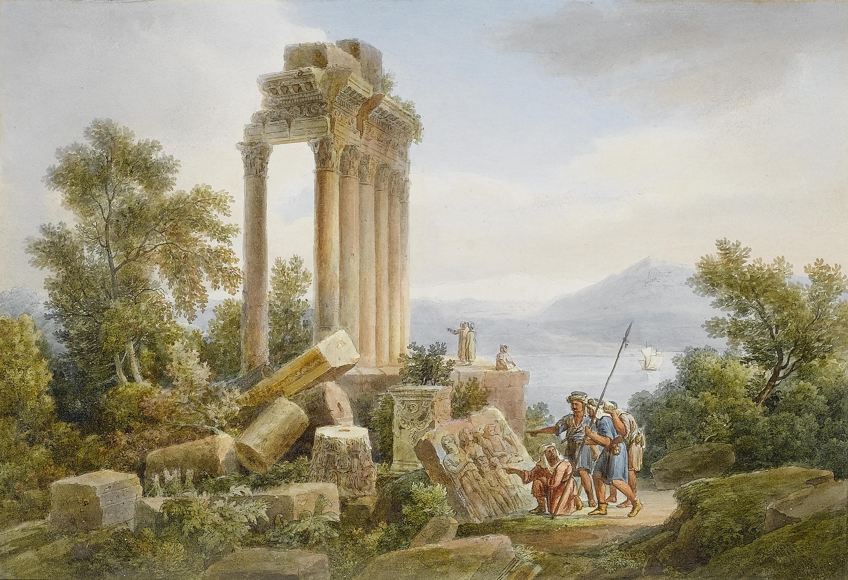 Ruines antiques sur les bords de la Mer Noire, pres de Trebisonde